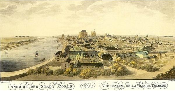 Blick von Norden - Köln um 1800